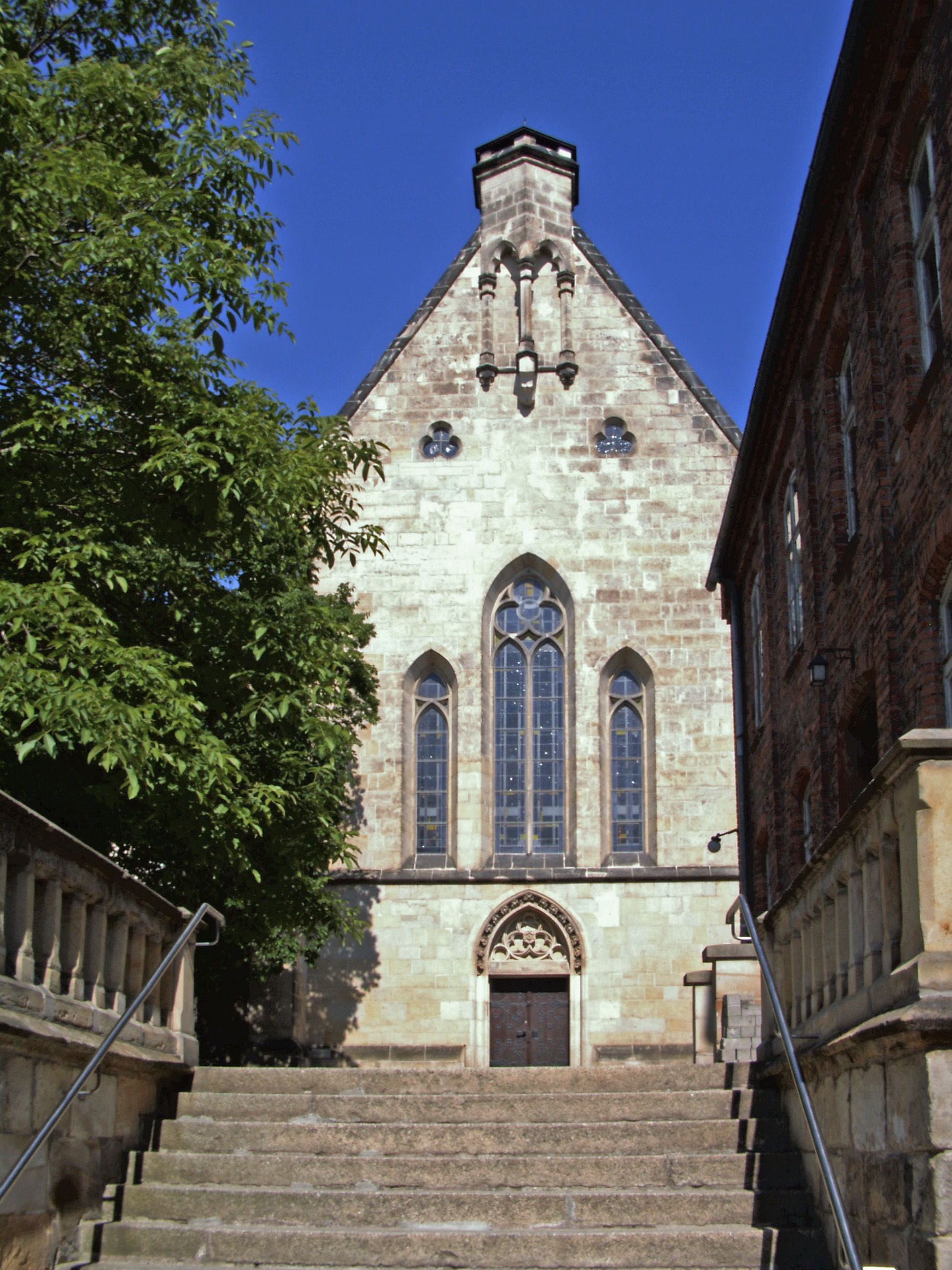 Katholische Kirche St. Mathilde in Quedlinburg, Landkreis Harz